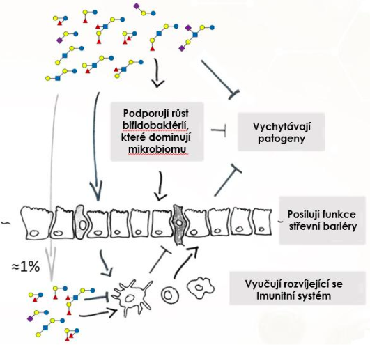 Vytvorené a upravené podľa: Rudloff S, Kunz C.: Milk Oligosaccharides and Metabolism in Infants. Adv. Nutr. 2012; 3: 398S–405S.